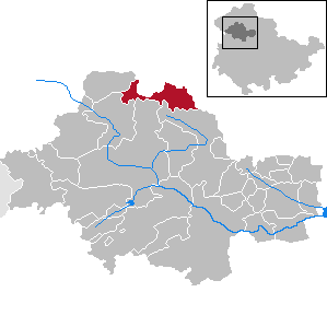 Menteroda in Thuringia - Unstrut-Hainich-Kreis